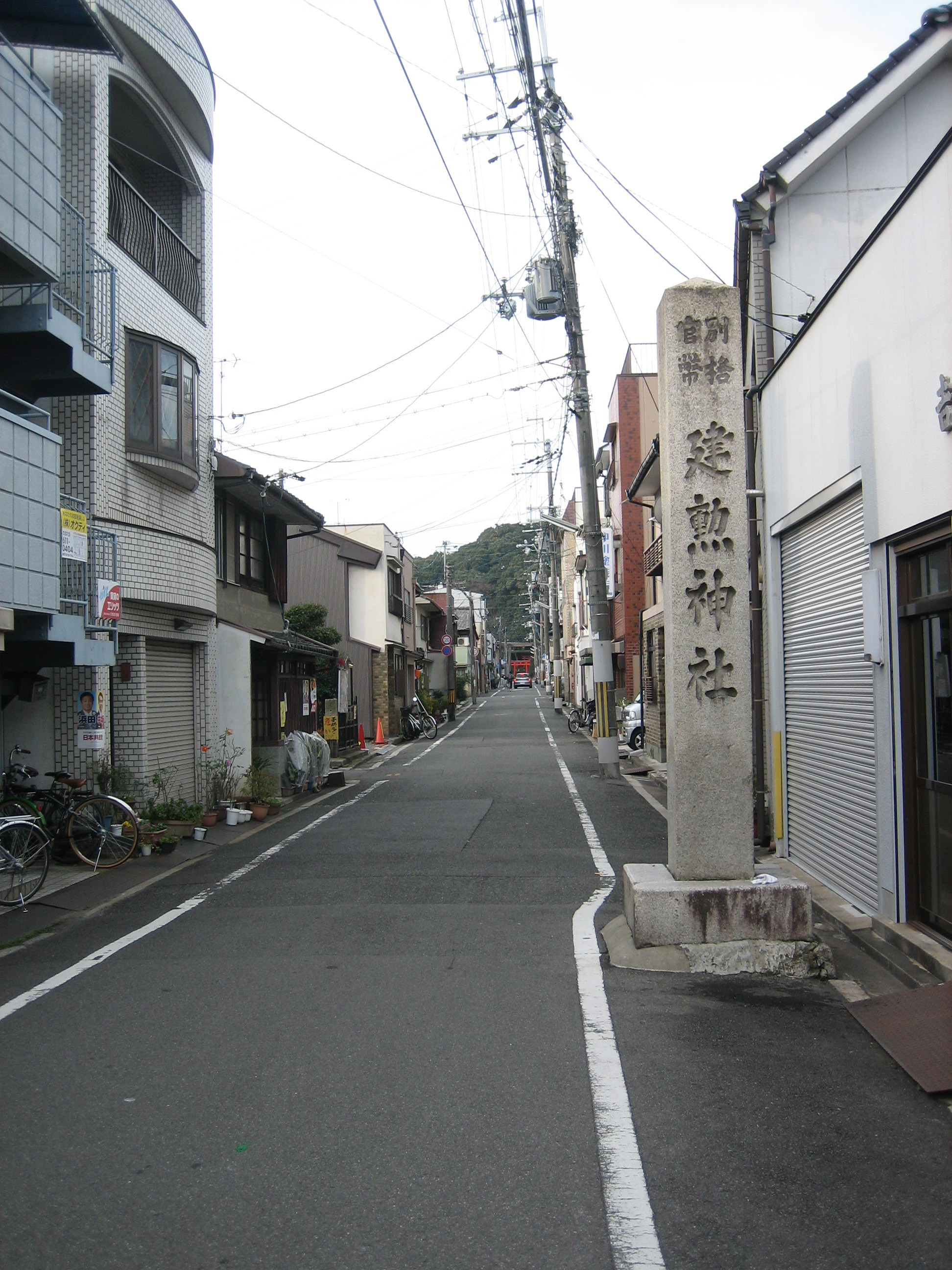 建勲通を京都市北区紫野雲林院町で撮影